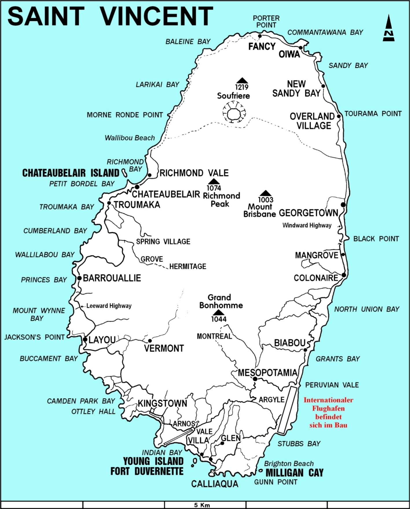 Karte von Saint Vincent